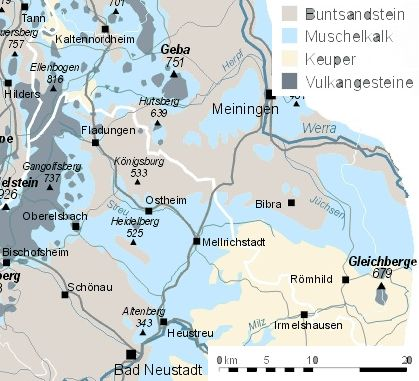 Geologische Karte des Östlichen Rhönvorlandes